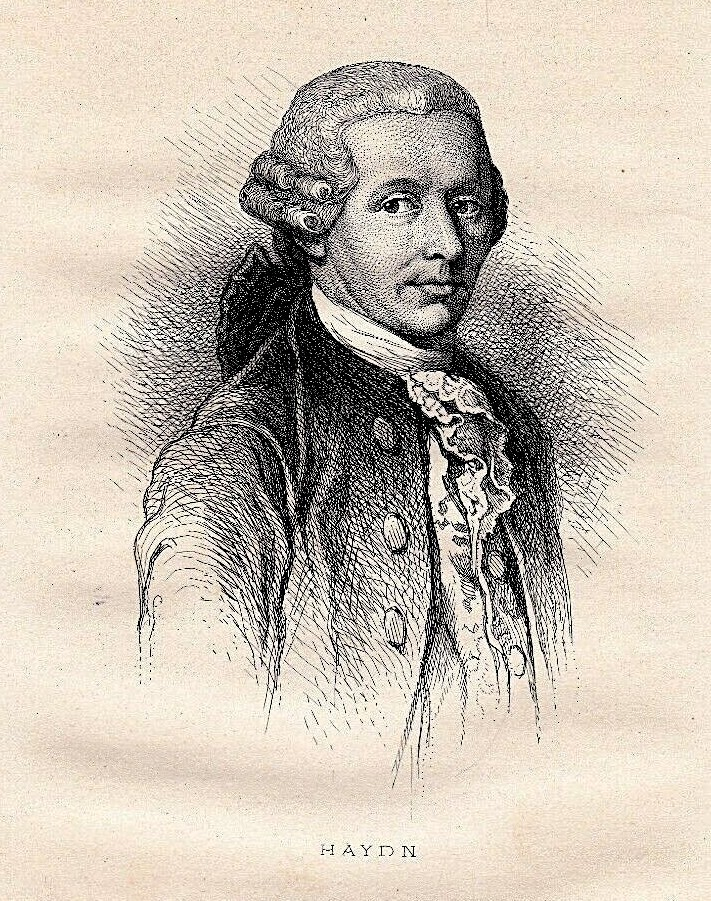 Eau-forte dimensions toute la feuille 26x15 centimètres. Franz Joseph Haydn — il n'utilisait jamais son premier prénom —, né à Rohrau sur la Leitha en Basse-Autriche, le 31 mars 1732 et mort à Vienne le 31 mai 1809, est un compositeur autrichien. Il incarne le classicisme viennois au même titre que Mozart et Beethoven, les trois compositeurs étant regroupés par la postérité sous le vocable de « trinité classique viennoise ». La carrière musicale de Joseph Haydn couvre toute la période classique, allant de la fin du baroque aux débuts du romantisme. Il est à la fois le pont et le moteur qui a permis à cette évolution de s'accomplir. L'image du « papa Haydn » ne vient pas des titres de « père de la symphonie » ou « père du quatuor à cordes » généreusement décernés au xixe siècle et même de nos jours. La création de ces genres relève d'une genèse un peu plus complexe, mais Haydn a très largement contribué à leur émergence et leur consolidation.